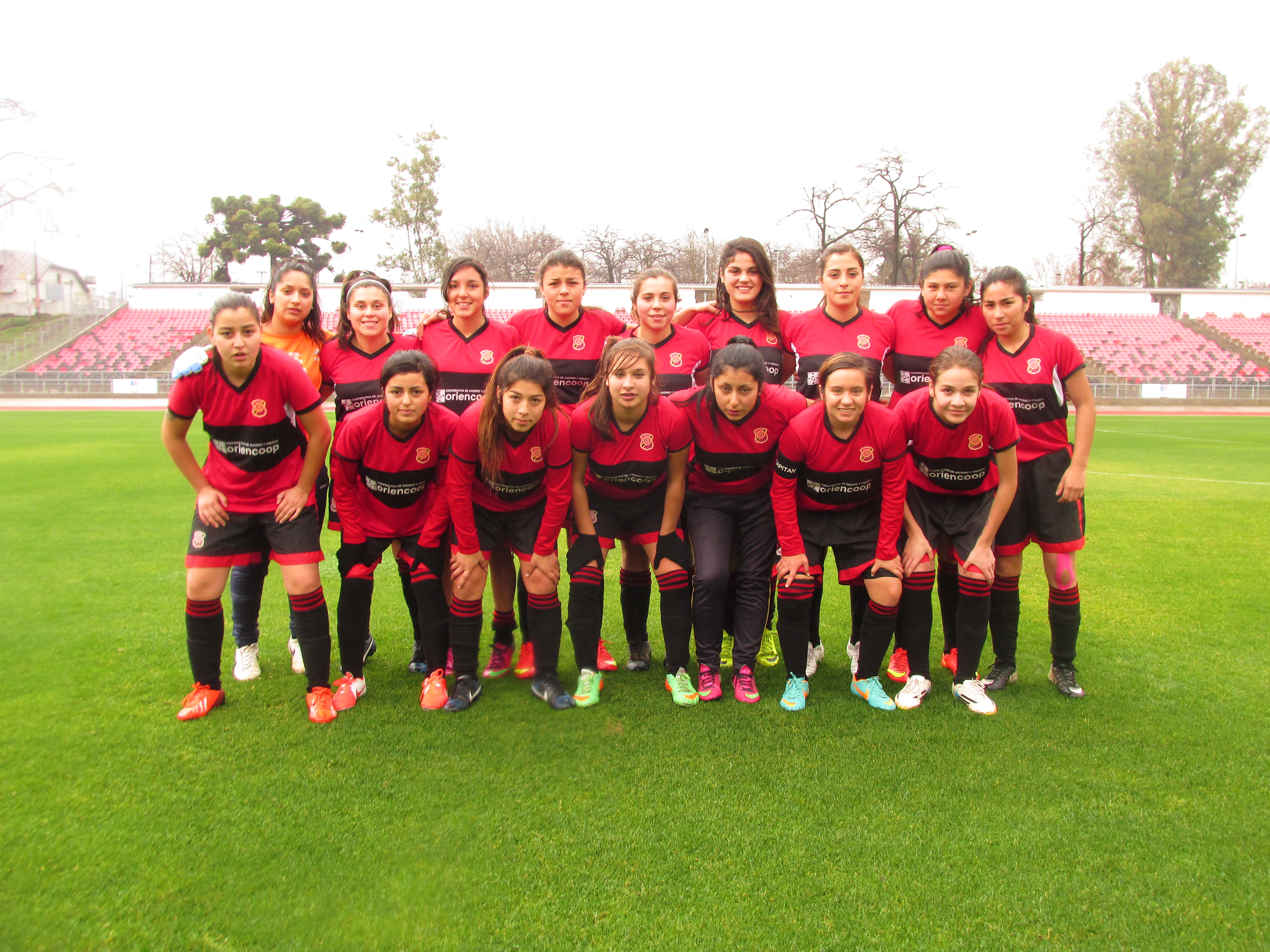 Plantel Rangers Femenino, Clasificatorias Binacionales 2014.